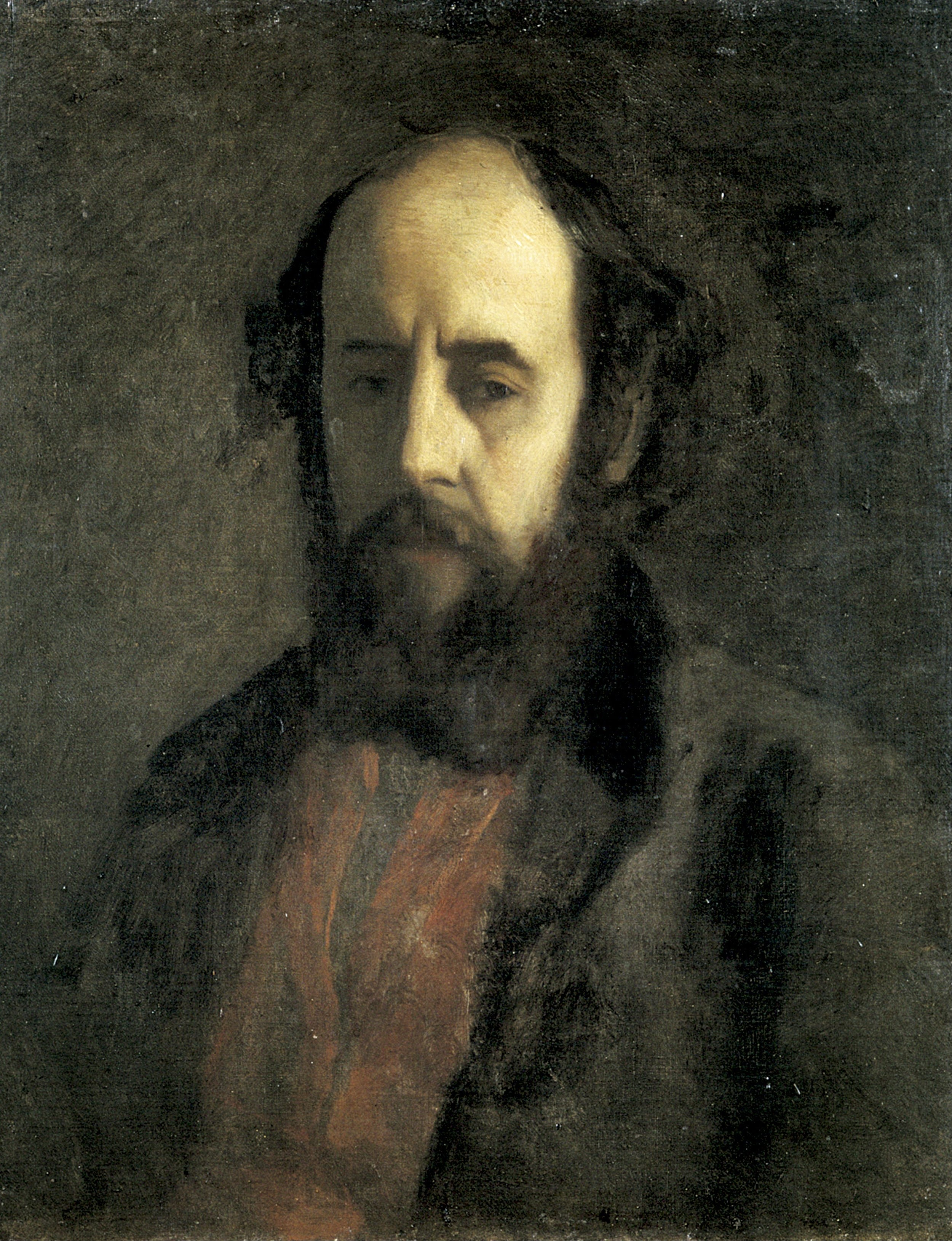 Retrato de Ignacio Merino por Francisco Laso